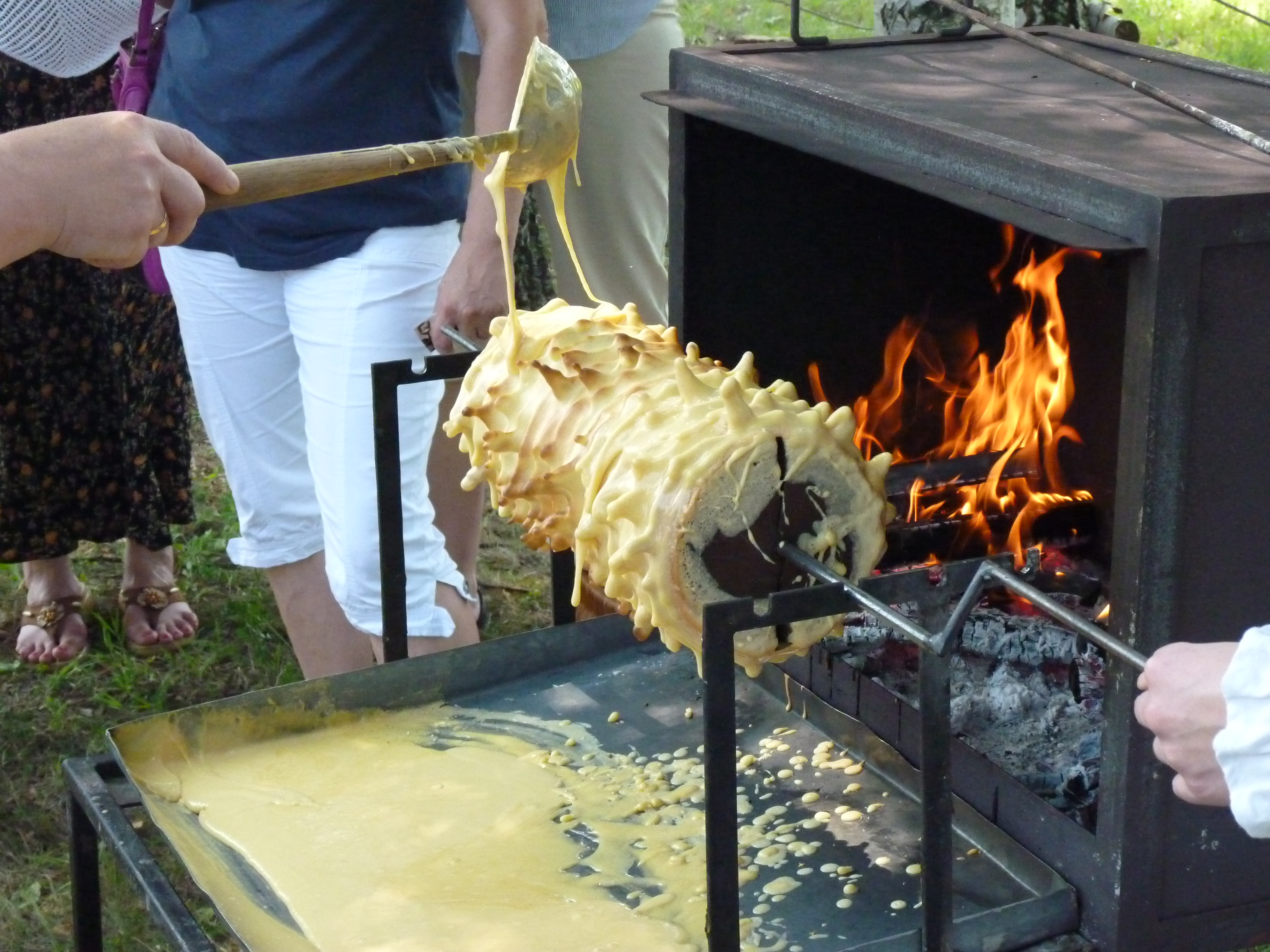 przygotowywanie sękacza - pokaz w ramach Smaków Podlasia 2012, Białostockie Muzeum Wsi